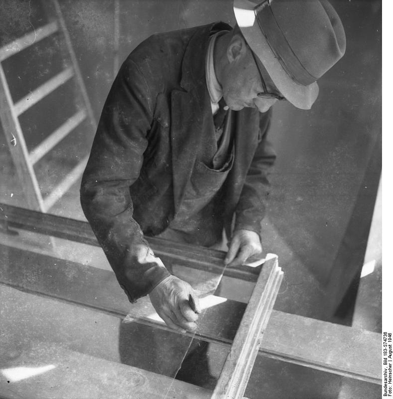 Glaser bei der Arbeit Glaser bei der Arbeit Aufn. Illus-Heinscher Aug. 46 282-46